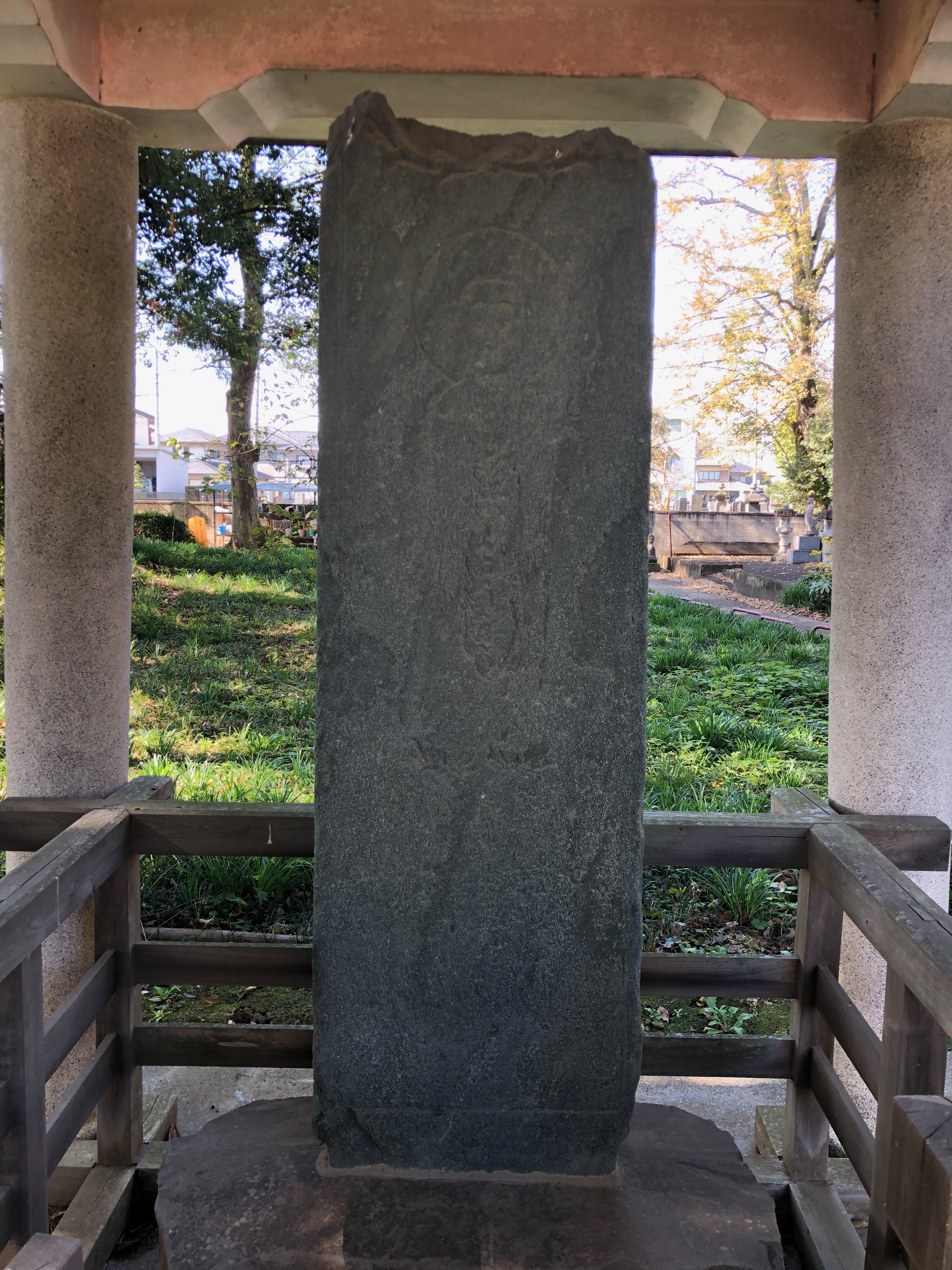 赤岩山光恩寺、地蔵菩薩画像板碑（表）